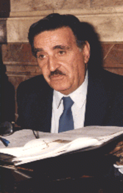 Alfredo Avelín político argentino de la provincia de San Juan.